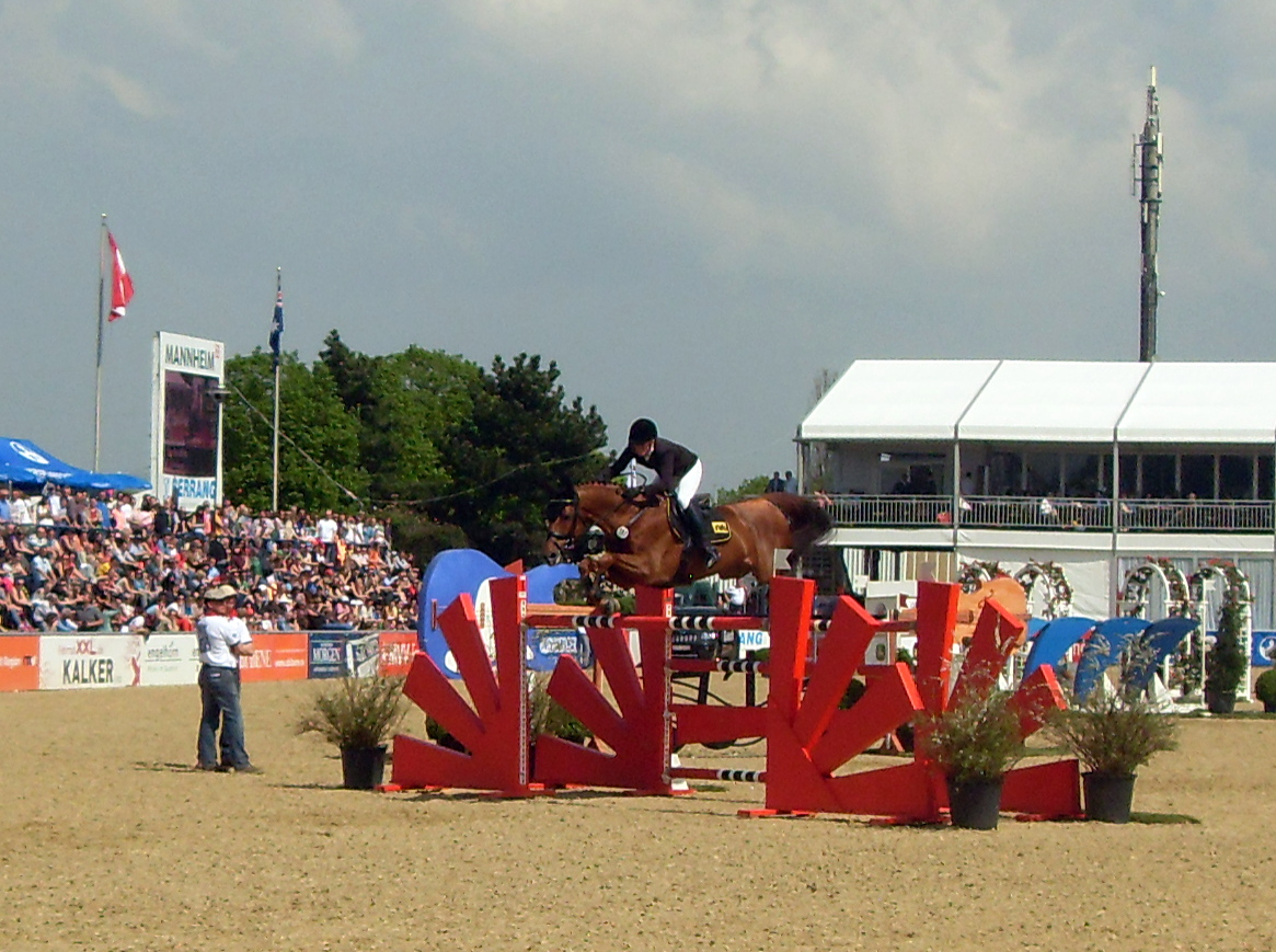 50. Maimarkt-Turnier, Eva Bitter mit Perigueux